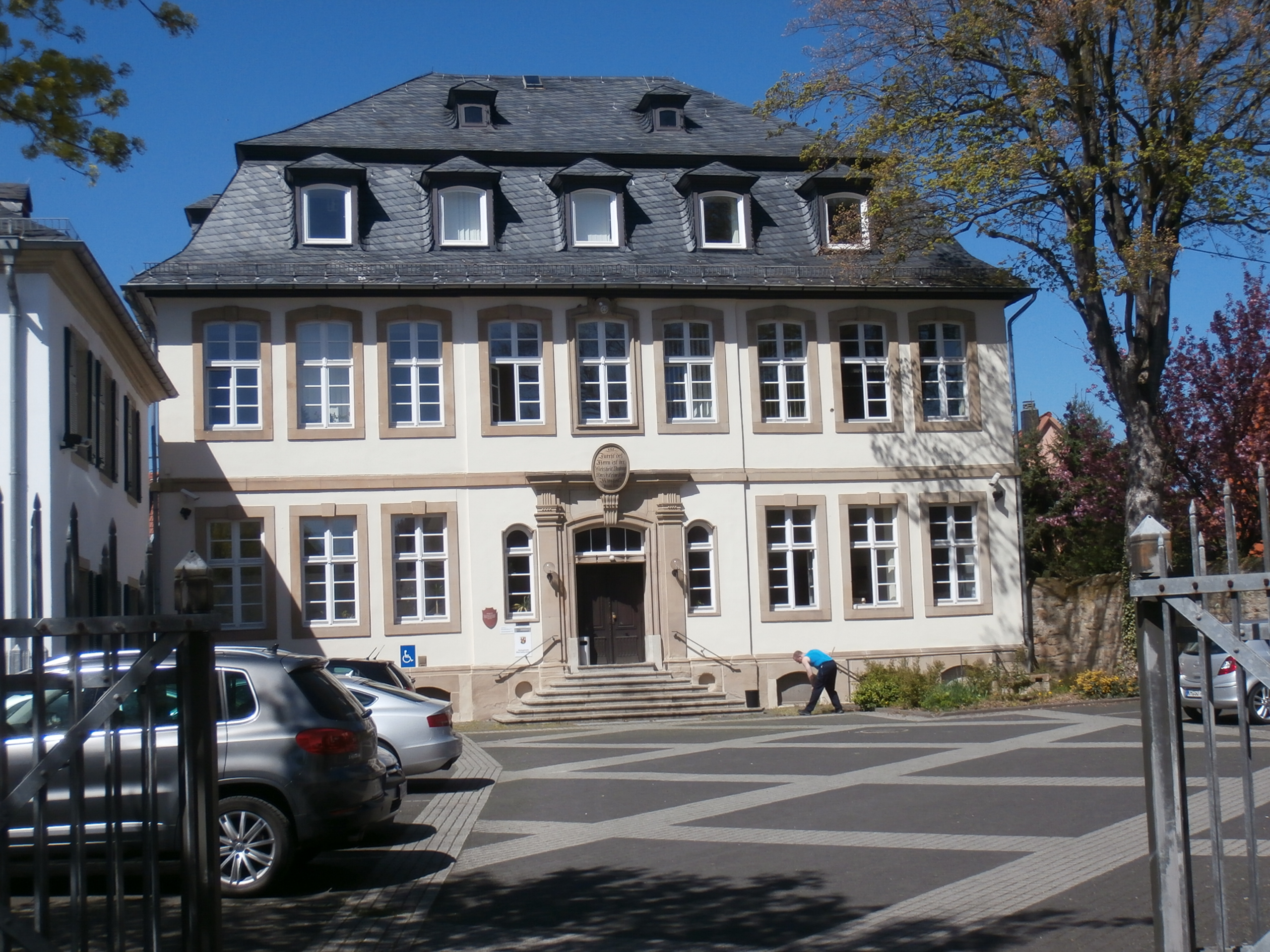 jetzt Amtsgericht; spätbarocker Walmdachbau, bezeichnet 1750